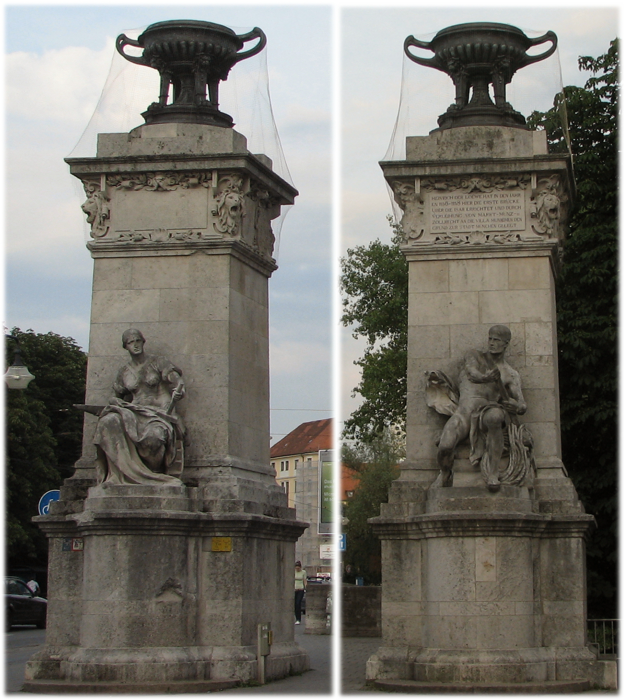 München, Ludwigsbrücke, Pylone rechts. Bildhauer: Syrius Eberle Eigene Aufnahme von Gerhard R. Schulze, Juni 2006